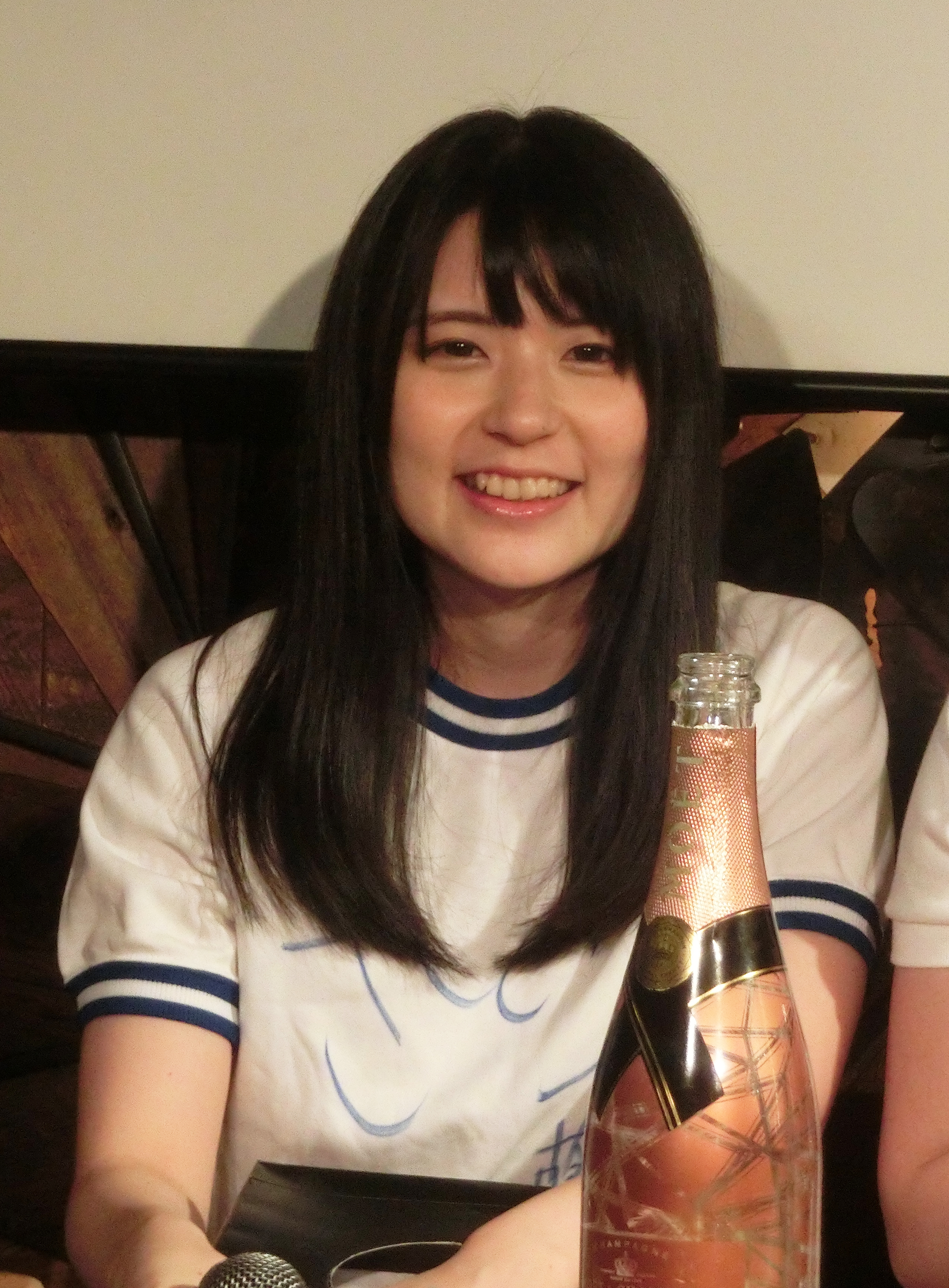 2019年10月6日、Adult video supporting actress prize